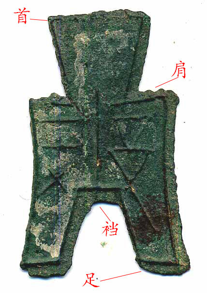 布币部件。